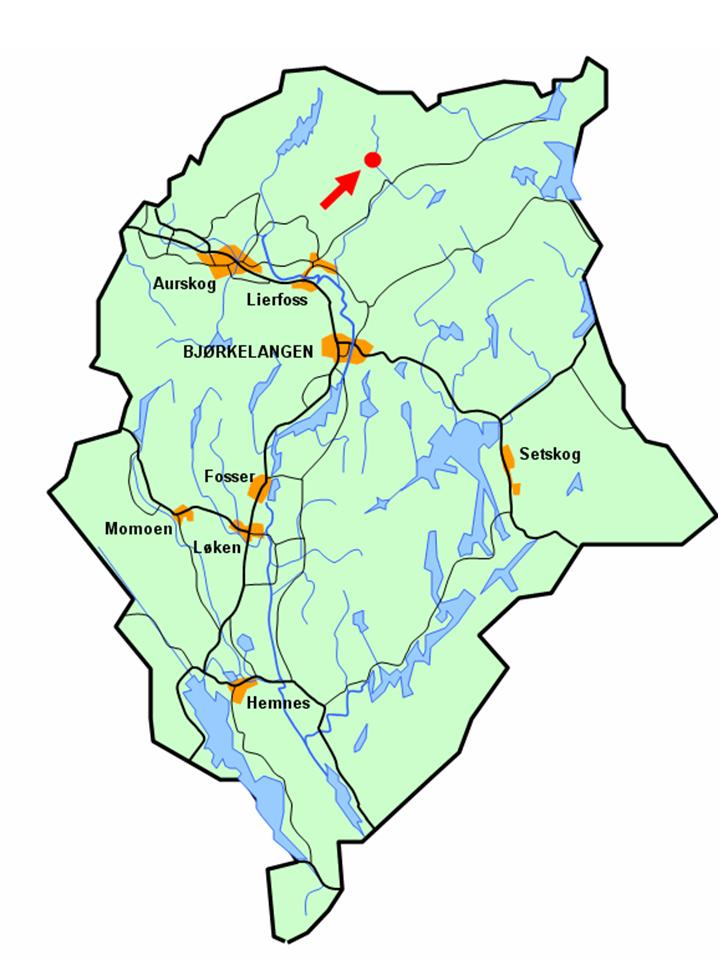 Stilisert kart som viser Tretjern sin lokalisering i Aurskog-Høland kommune.